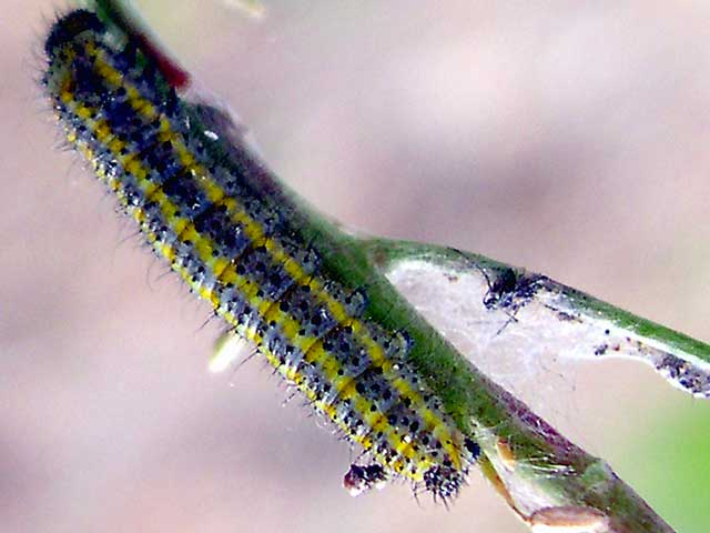 Pontia daplidice, larva